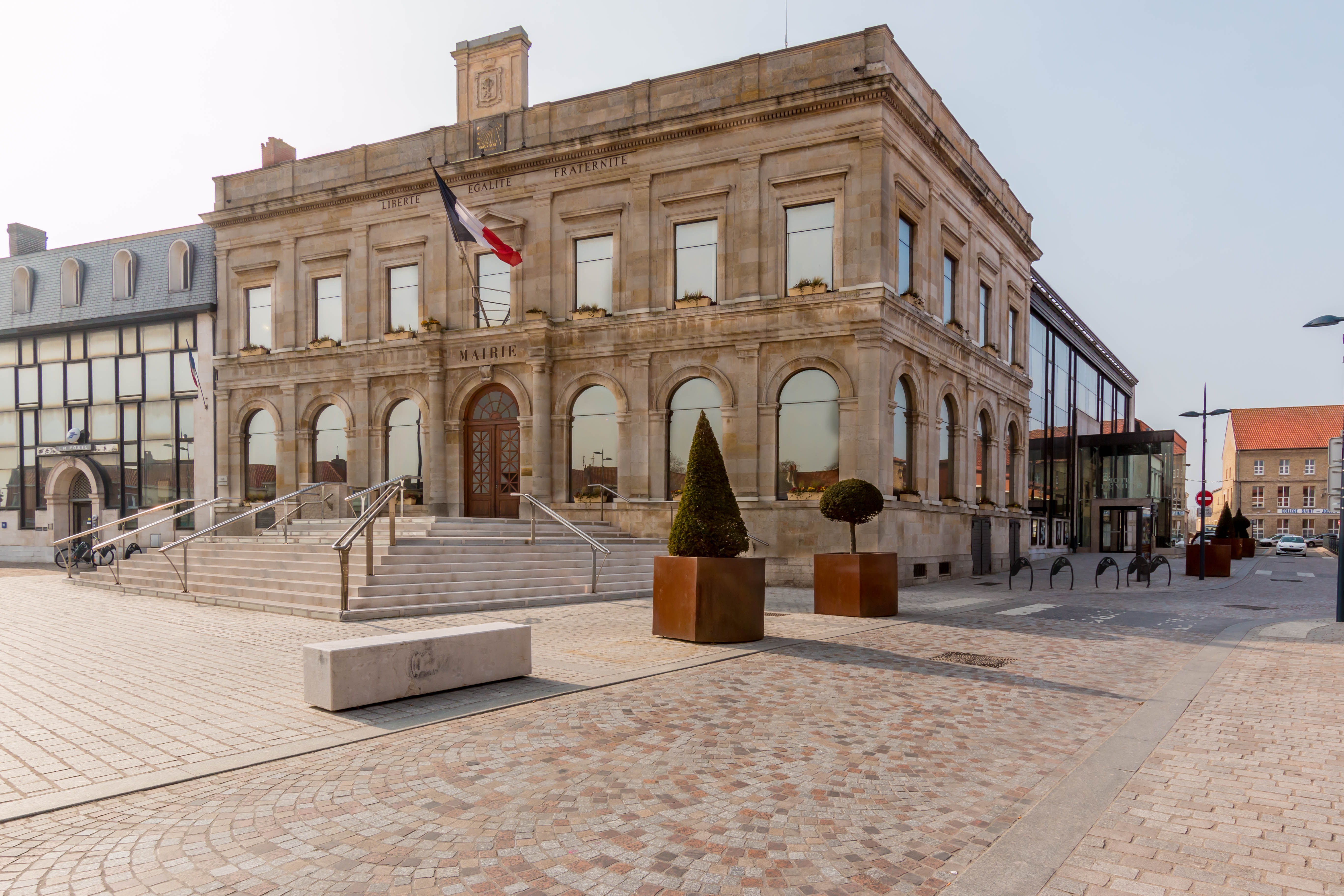 Hôtel de ville de Gravelines, département du Nord, France.